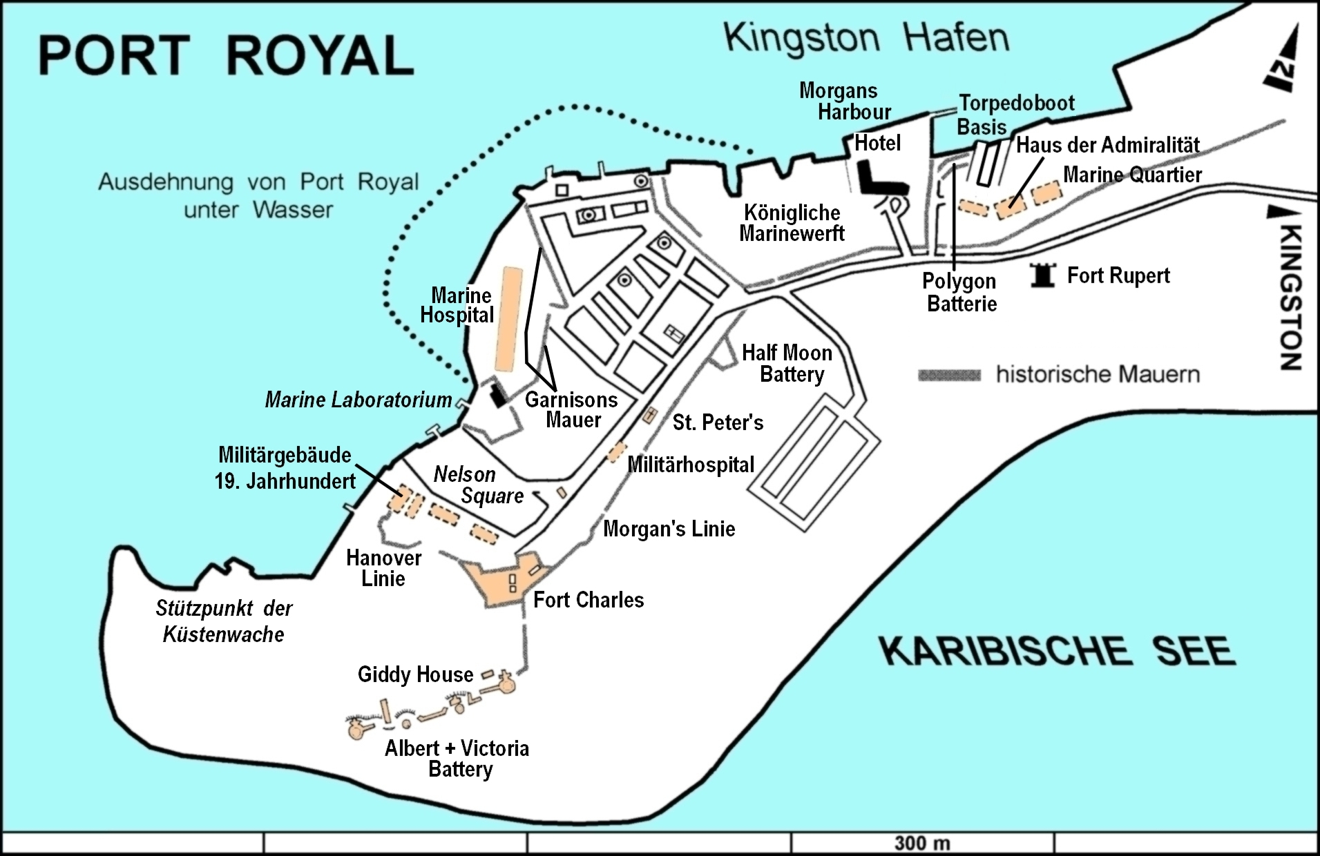 Karte von Port Royal